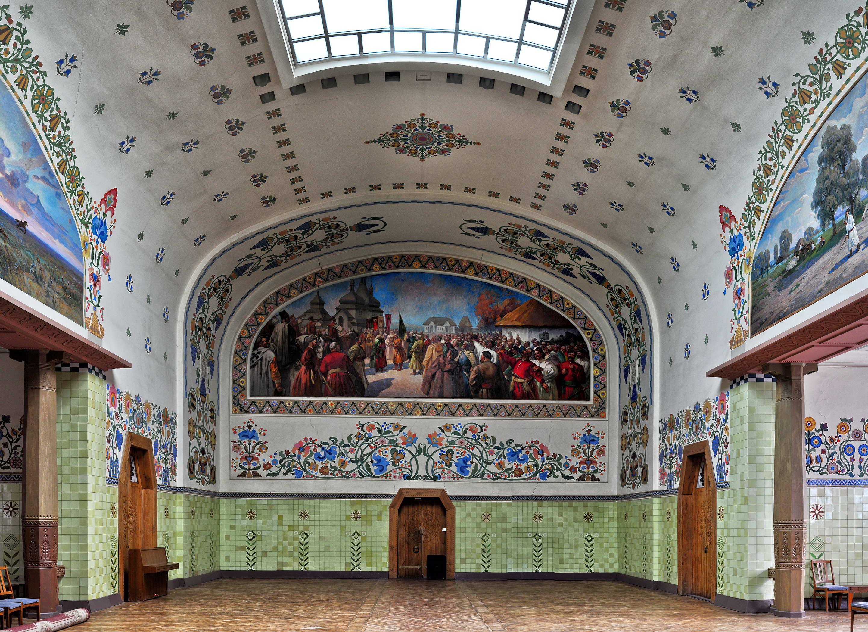 Wnętrze połtawskiego muzeum krajoznawczego. Sala główna.